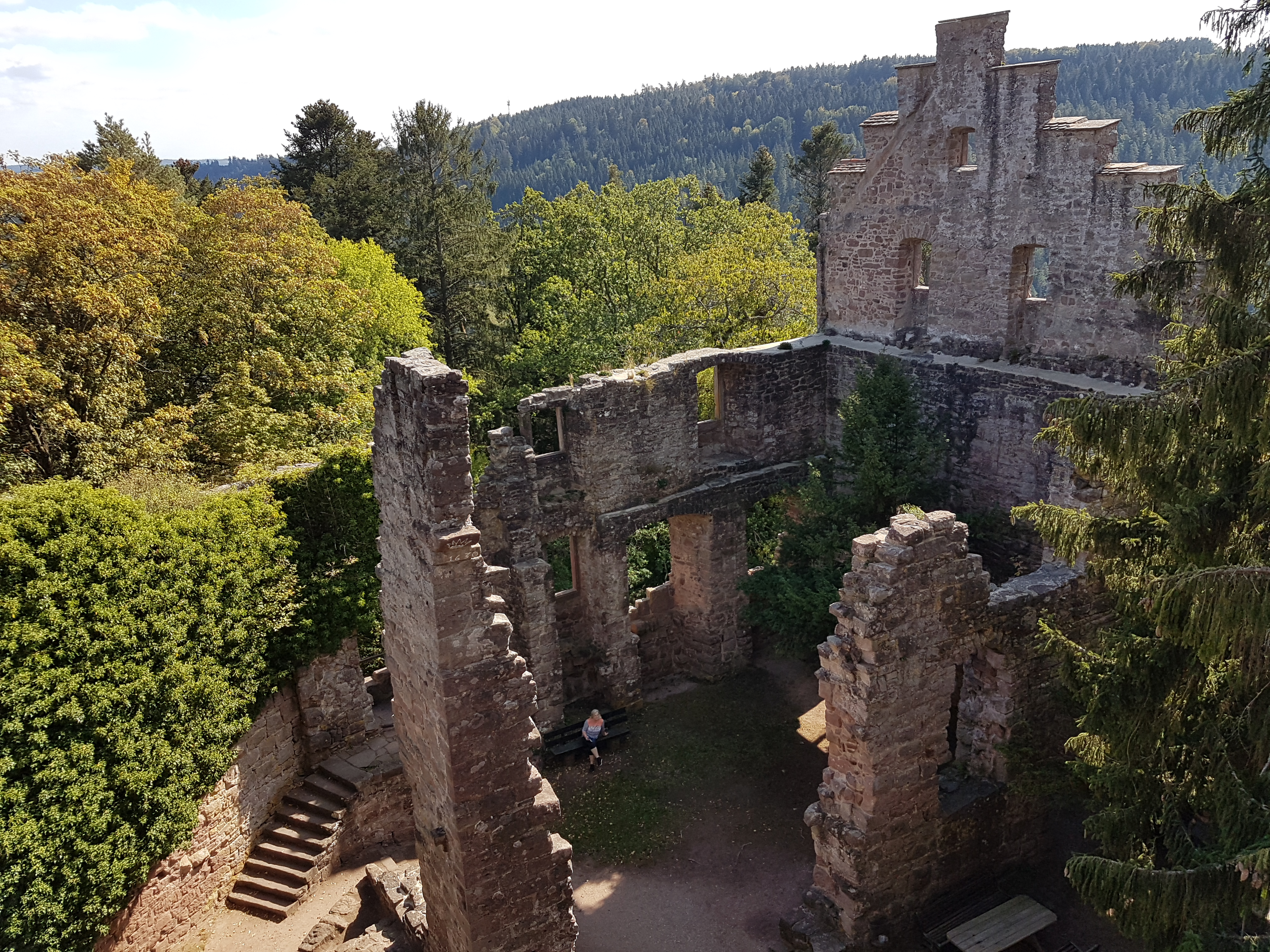 Burg Zavelstein, Nordschwarzwald